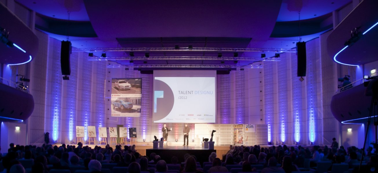 Talent designu 2014, slavnostní vyhlášení, Kongresové centrum Zlín.